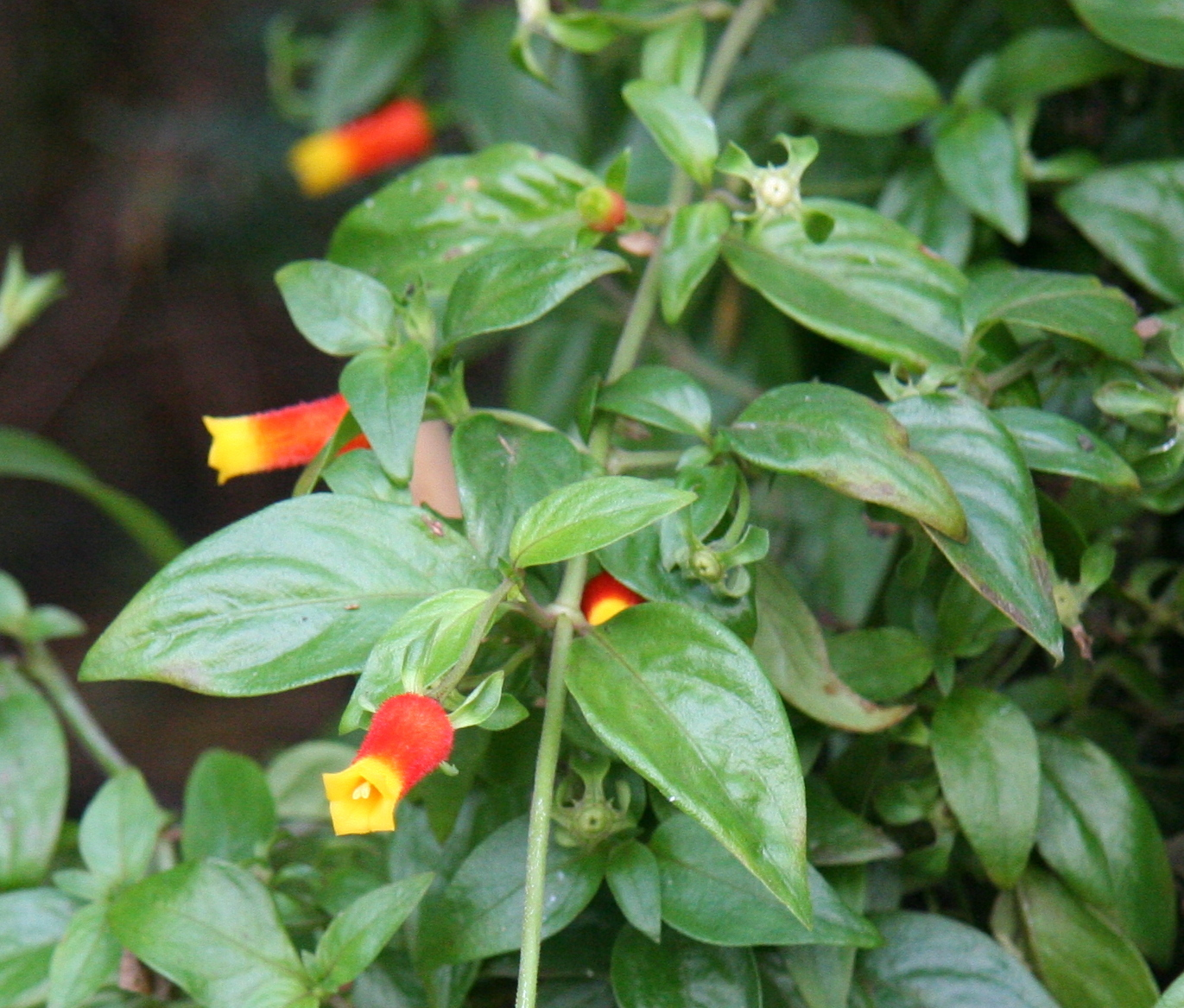 Manettia luteorubra im Botanischen Garten Dresden